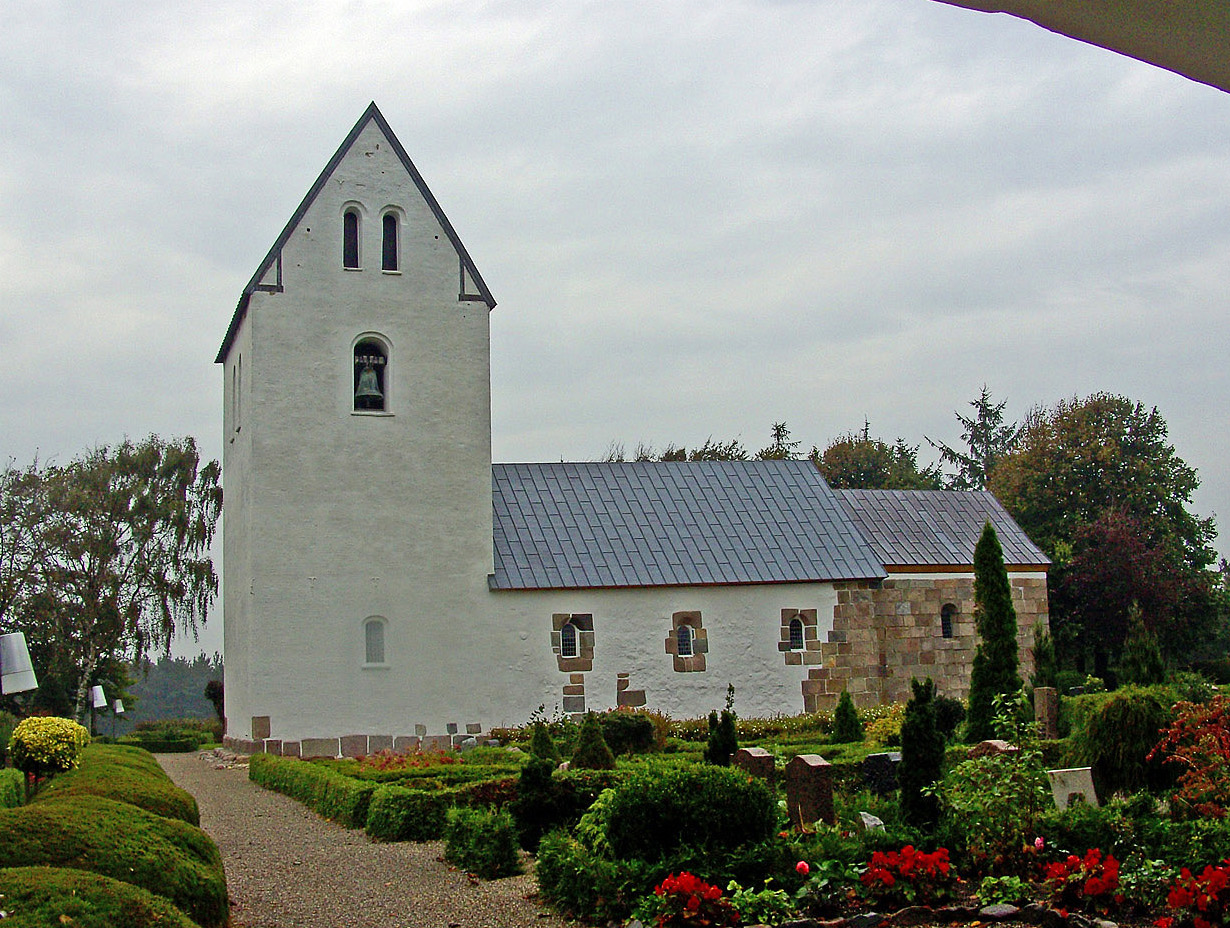 fra syd